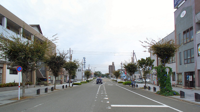 この写真の前の版には 2004年9月6日 の駅前の様子があります。 JRja:鹿児島本線ja:八代駅 駅前風景 駅前から南西を見る。約300mでja:国道3号に突き当たる。 撮影者/著者/著作権保有者 : MK Products (本人がアップロード) 撮影日 : 2007/10/19 良い画像があれば別の画像に変えてください。